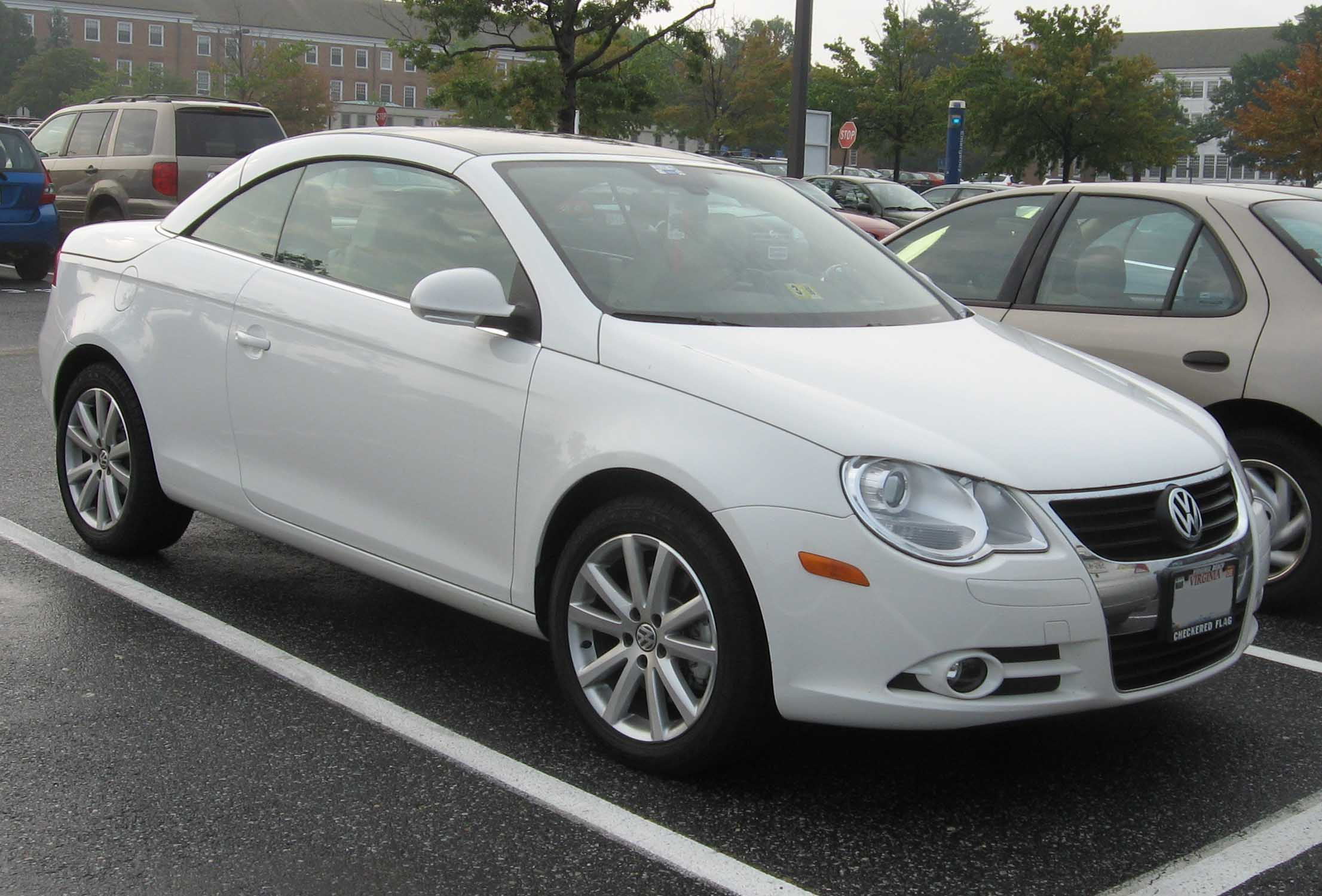 2007 Volkswagen Eos photographed in USA.